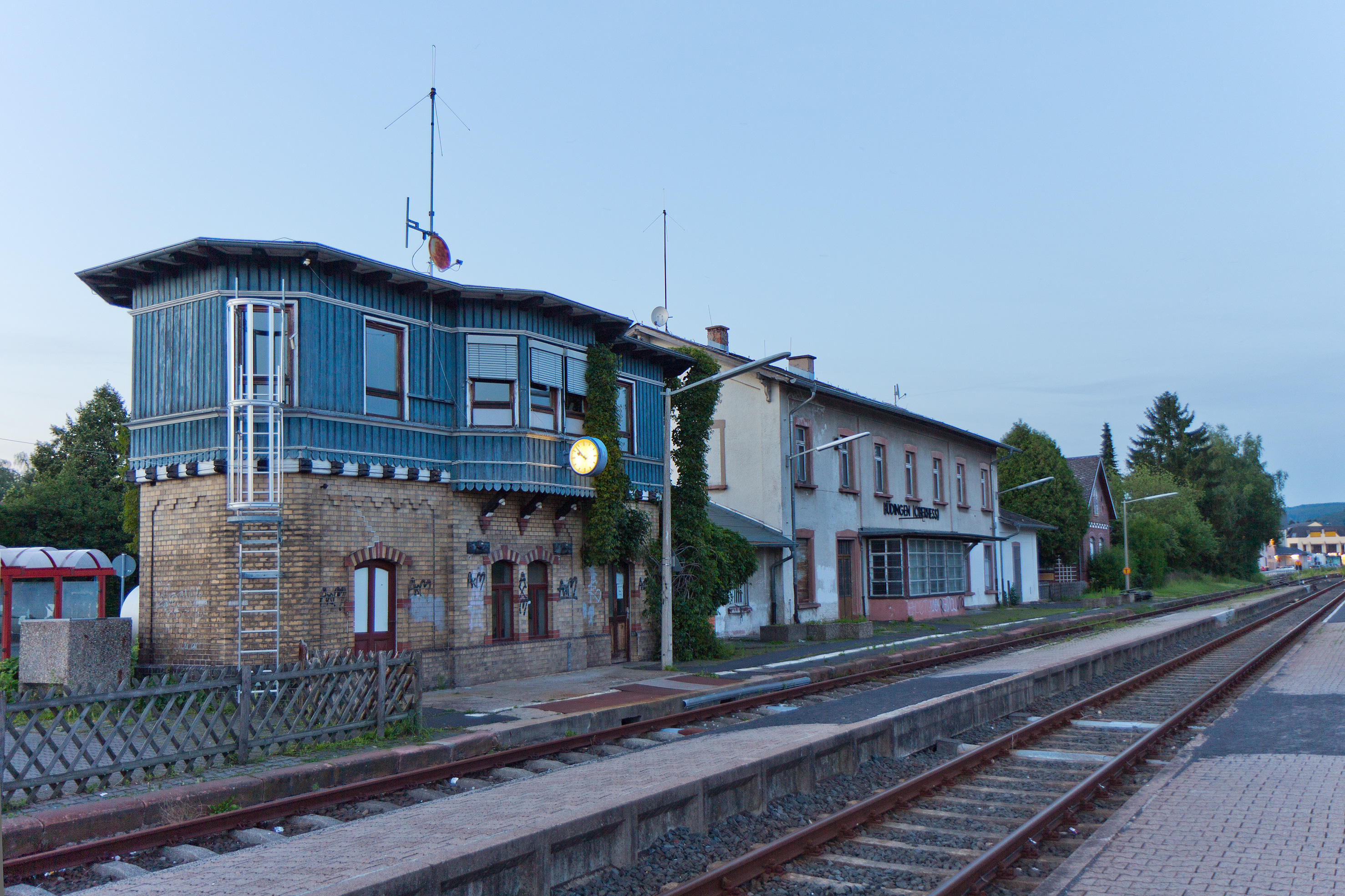 Bahnhof Büdingen (Oberhess) (die Bahn hat wohl Schwierigkeiten mit der Rechtschreibung) in Büdingen (Wetteraukreis).